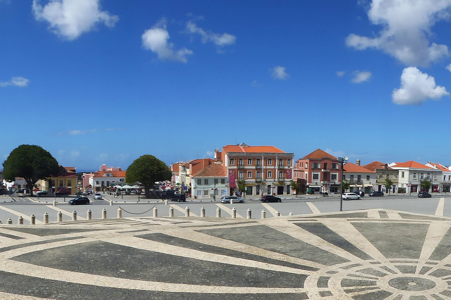 Mafra mit dem umgebauten Terreiro D. João V (keine Parkplätze mehr) vor dem Palácio Nacional - Foto 2016 Wolfgang Pehleman DSC00839.jpg